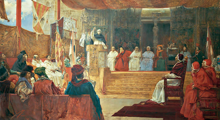 Salvador Viniegra y Lasso de la Vega, El Compromiso de Caspe, 1891. Círculo de Bellas Artes de Madrid.